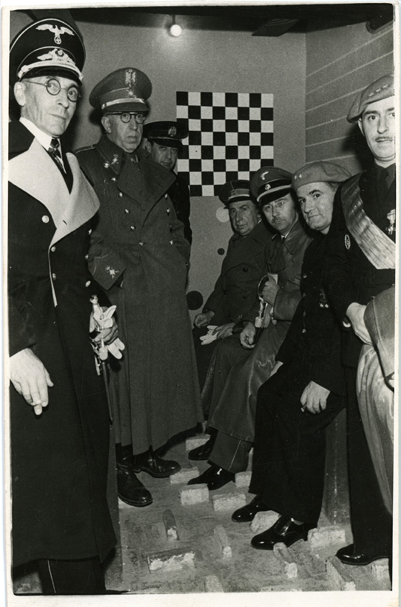 Himmler (tercero por la derecha) de visita en una checa, Barcelona, 23 de octubre de 1940.